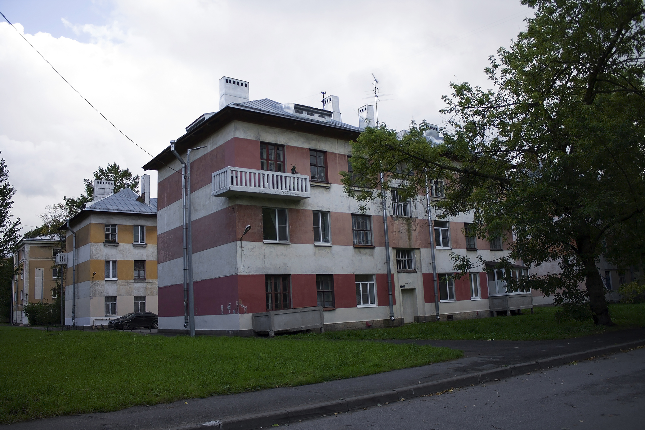 Рабочий городок при ГРЭС 'Красный Октябрь' (ТЭЦ №5) (13 жилых домов): Октябрьская набережная, 90 корпуса 1, 2, 3, 4; 92 корпуса 1, 2, 3; 94 корпуса 1, 2, 3; 96 корпуса 1, 2, 3, Невский район, Санкт-Петербург